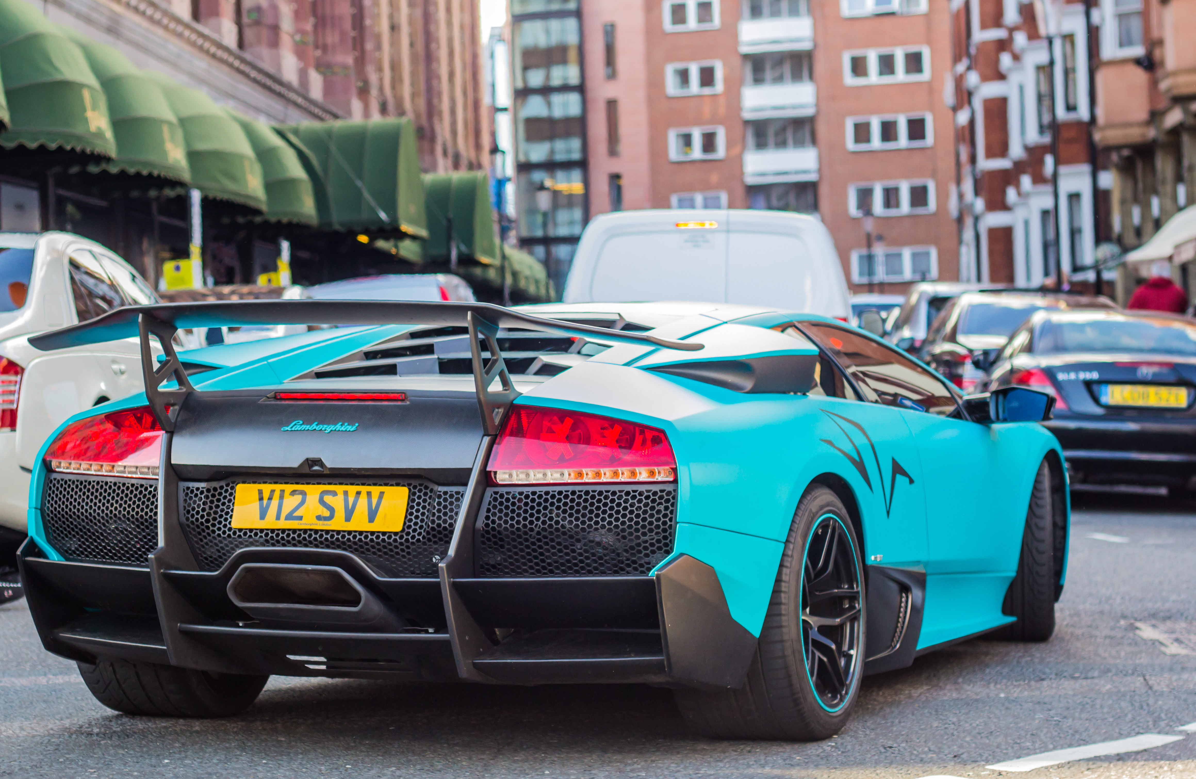 big back